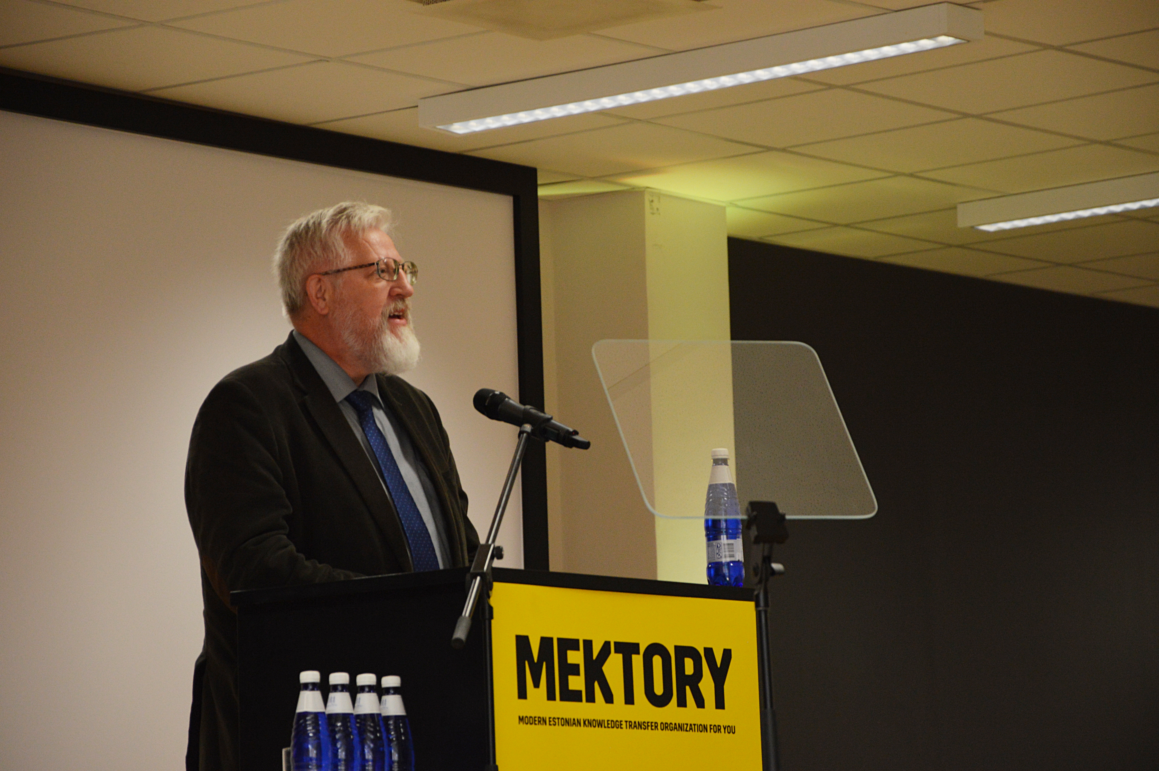 Tarmo Soomere